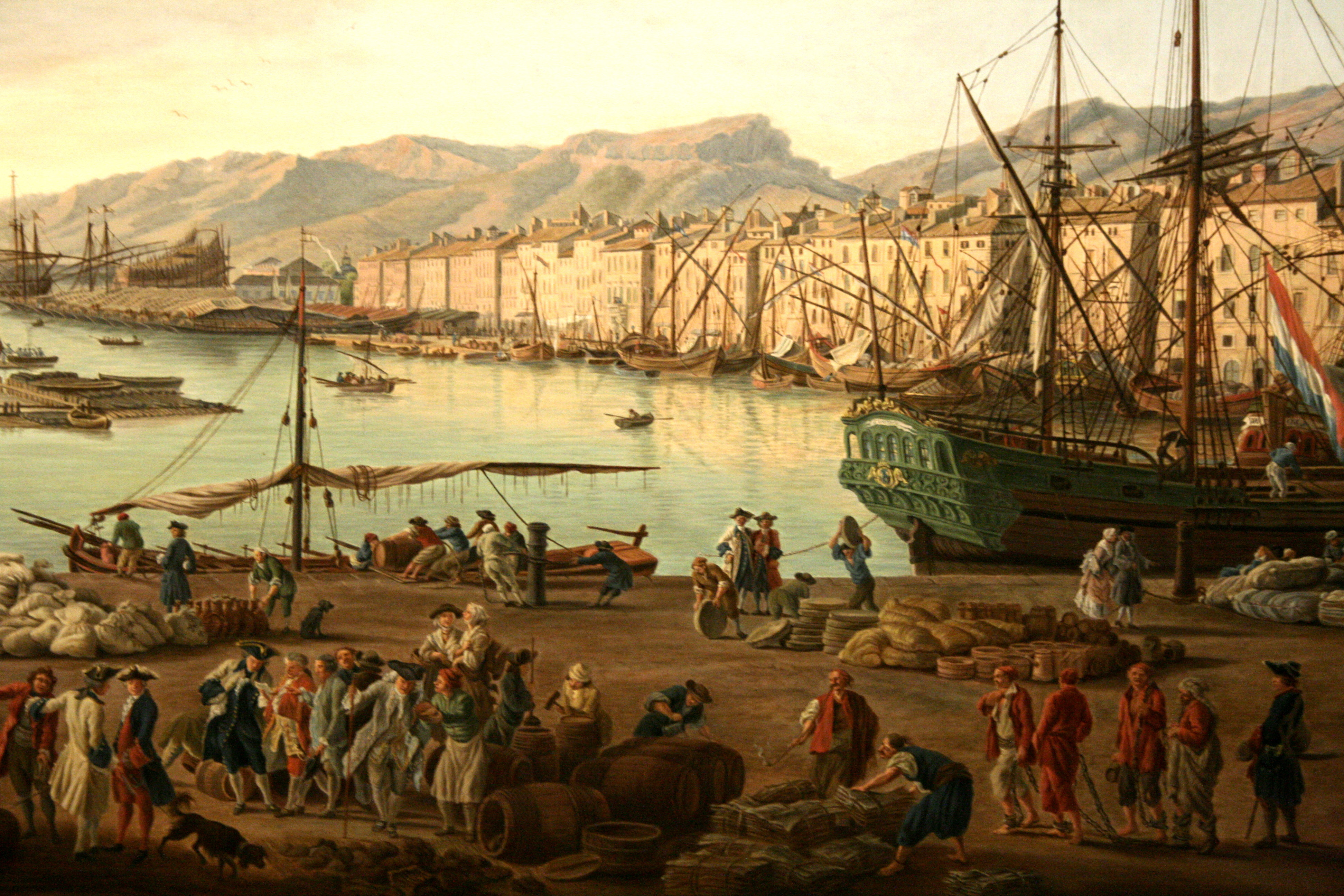 Série des ports de France. Toulon (detail)